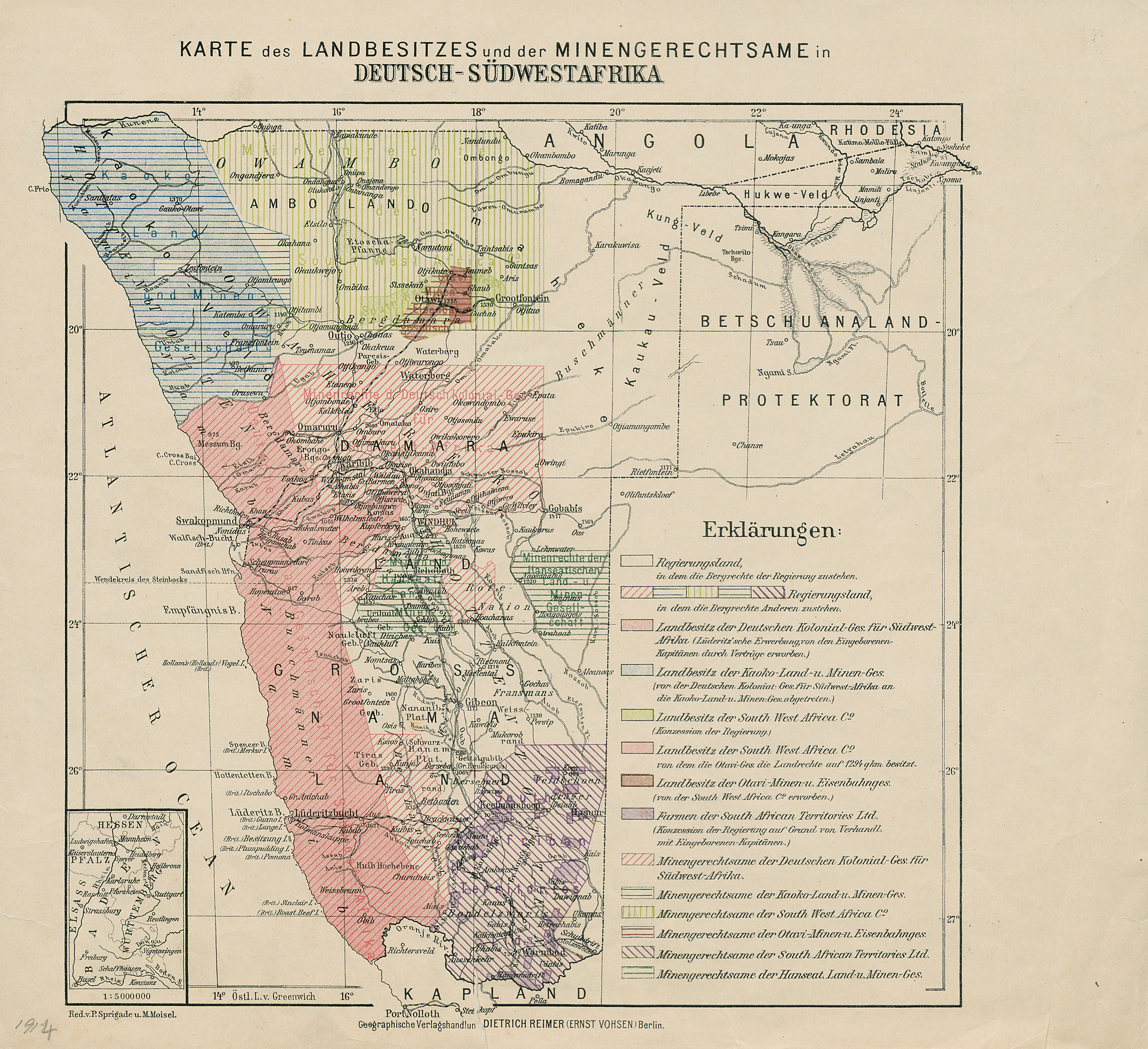 Karte des Landbesitzes und der Minengerechtsame in Deutsch-Südwestafrika